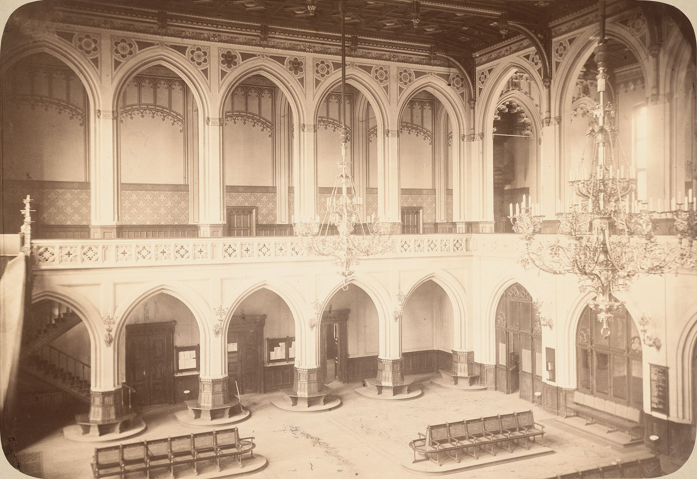 Wrocław Stare Miasto, ul. Krupnicza 15 - Nowa Giełda, obecnie Klub Sportowy "Gwardia"